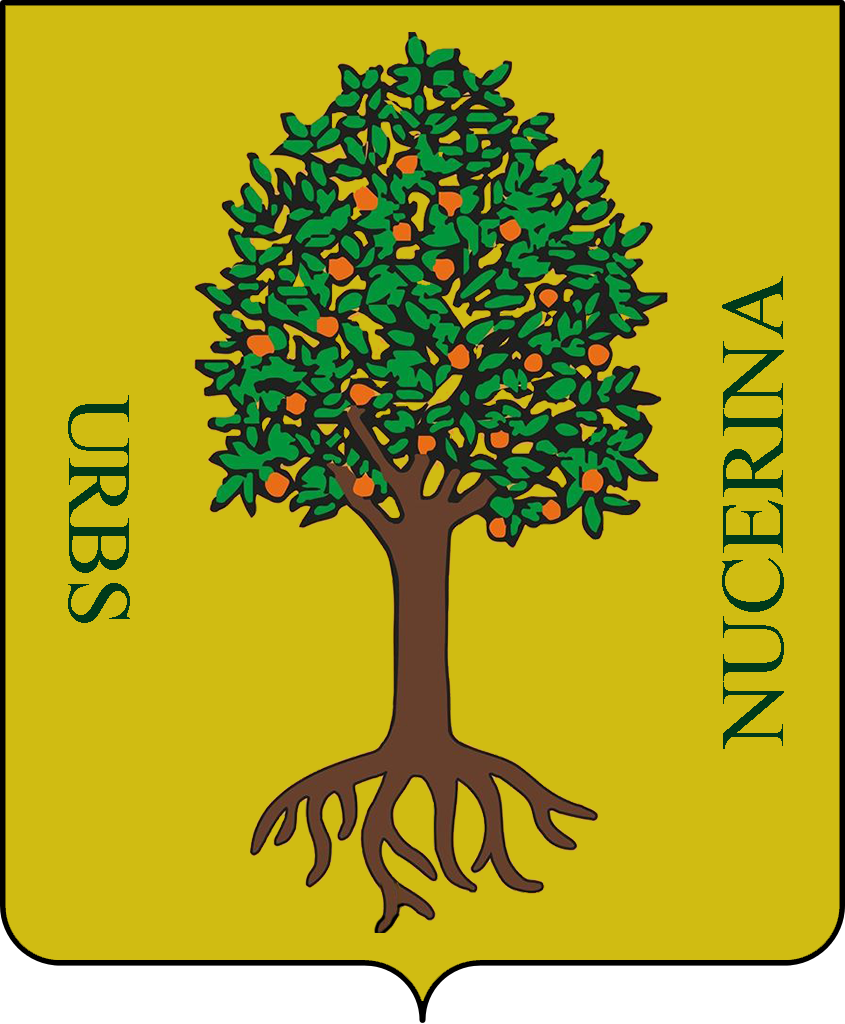 Riadattazione dello stemma dell'antica università di Nocera Corpo, realizzato seguendo le ricerche storiche usate anche dalle associazioni rievocative del territorio. La riproduzione è approssimata ed ha un puro fine informativo e didattico.